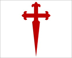 Bandera de Santiago de la Ribera, en el municipio de San Javier (Murcia, España)